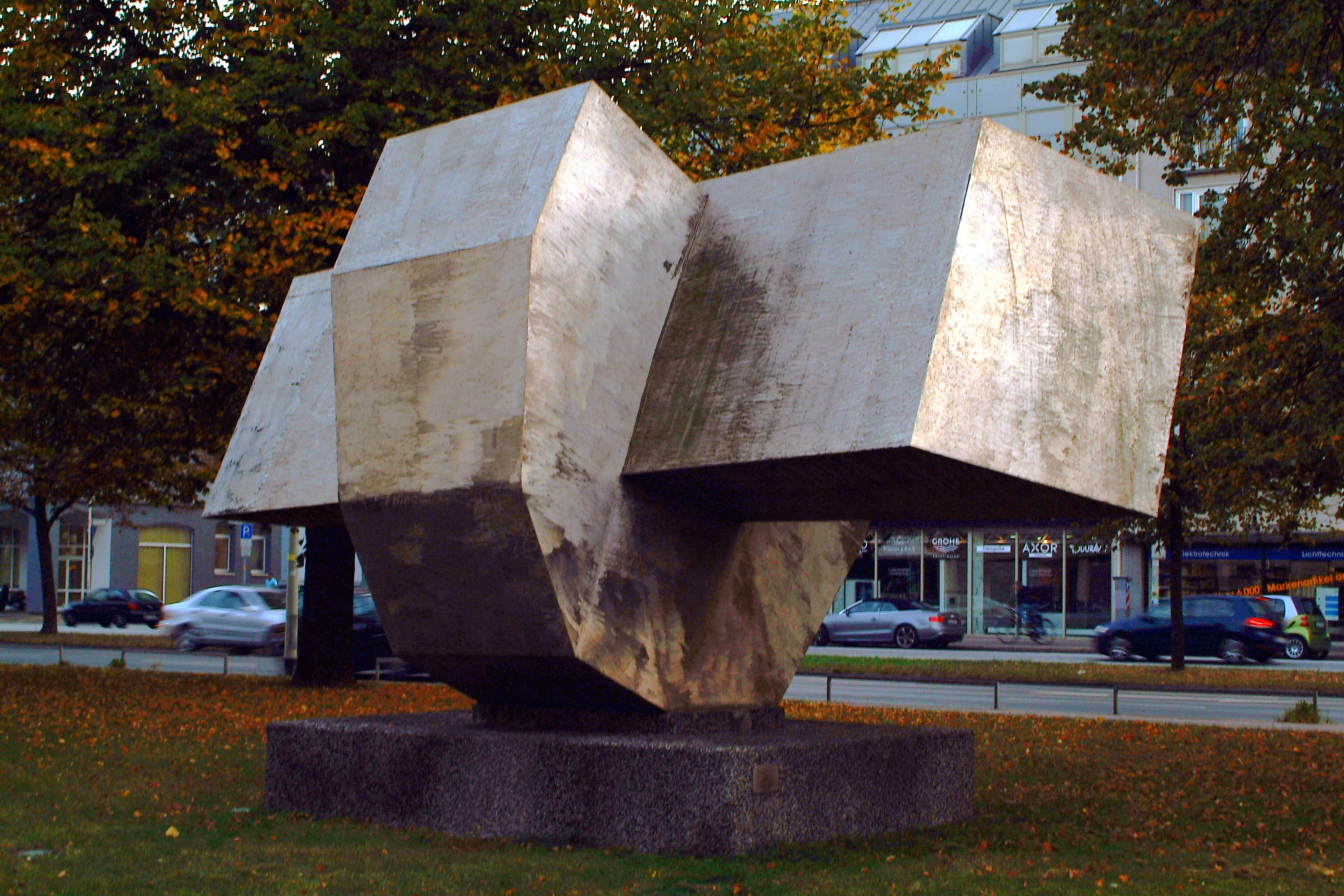 Jorge La Guardia, Durchdrungene, 1979, vor der Handwerkskammer Hannover, Berliner Allee 17, Info-Tafel Lüder-Stiftung Henry Lüders 1894 - 1966.jpg